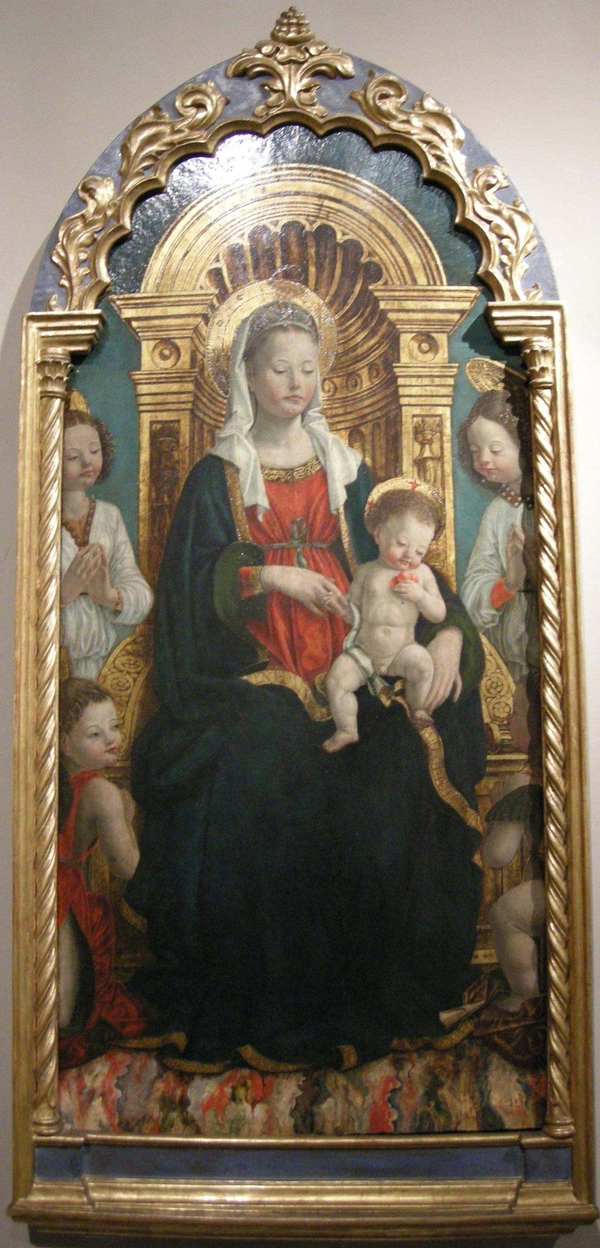 Giovanni Martino Spanzotti, Madonna col bambino in trono e quattro angeli, 1475-80